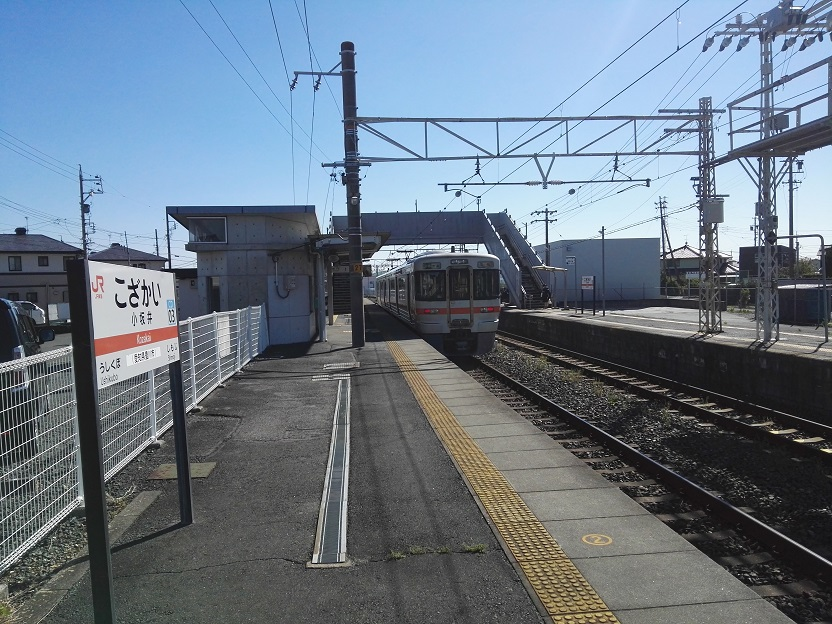 Kozakai station platform